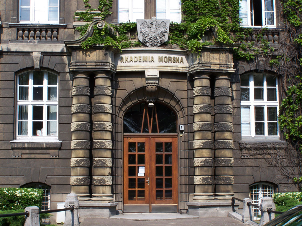 Seefahrtshochschule (bzw. -akademie) an den Wały Chrobrego 1 (Hakenterrasse 1) in Stettin, Emil Drews errichtete 1902-05 den Bau nach seinem Entwurd als Landesversicherungsanstalt Pommern